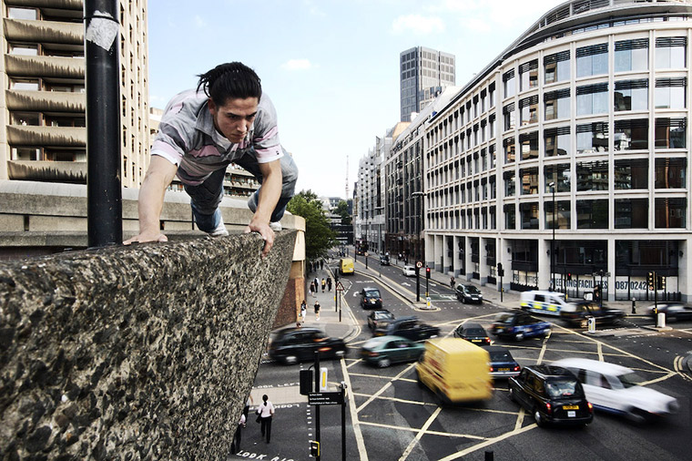 Daniel Ilabaca does a cat balance.